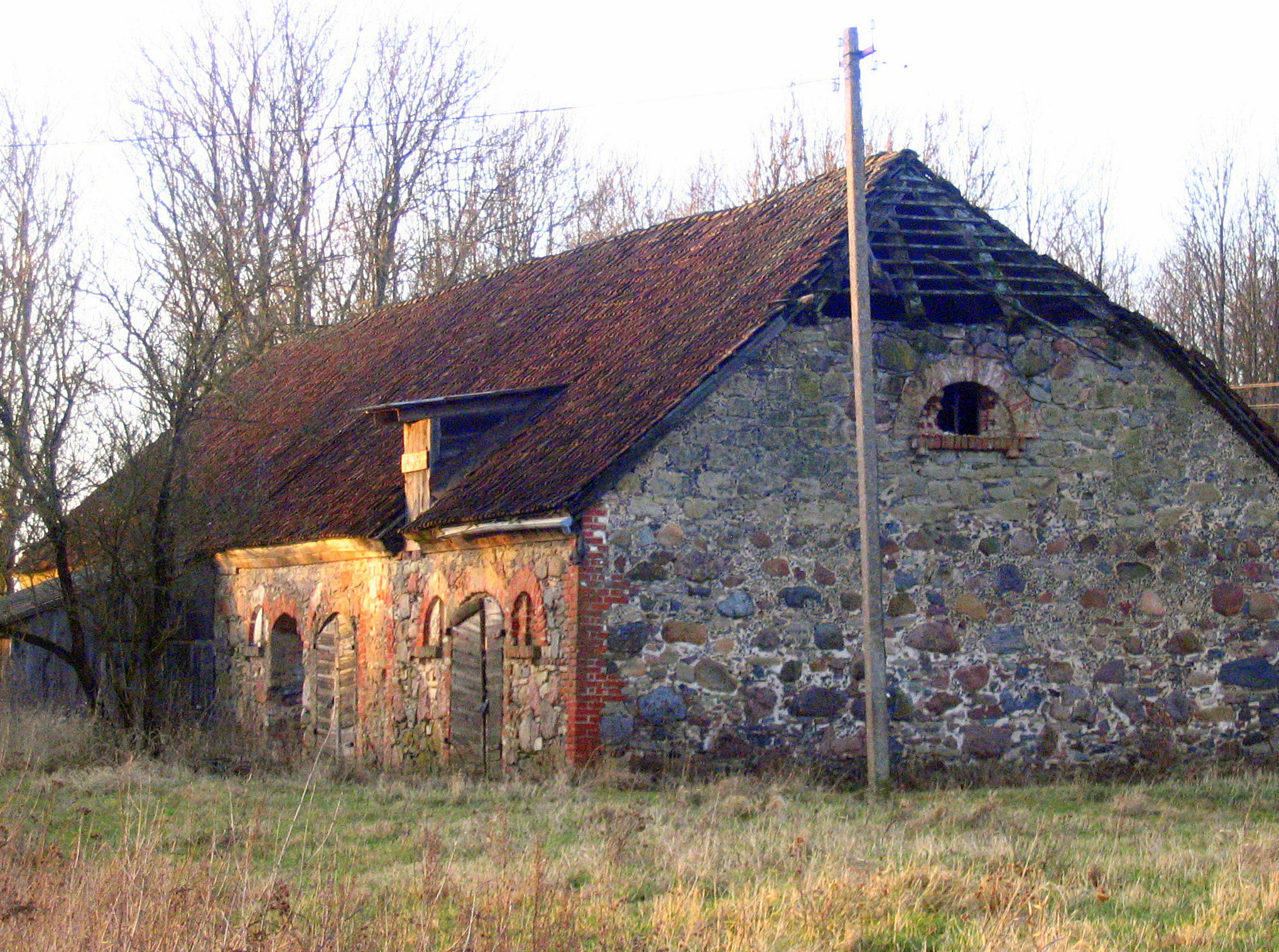 barn near Basi